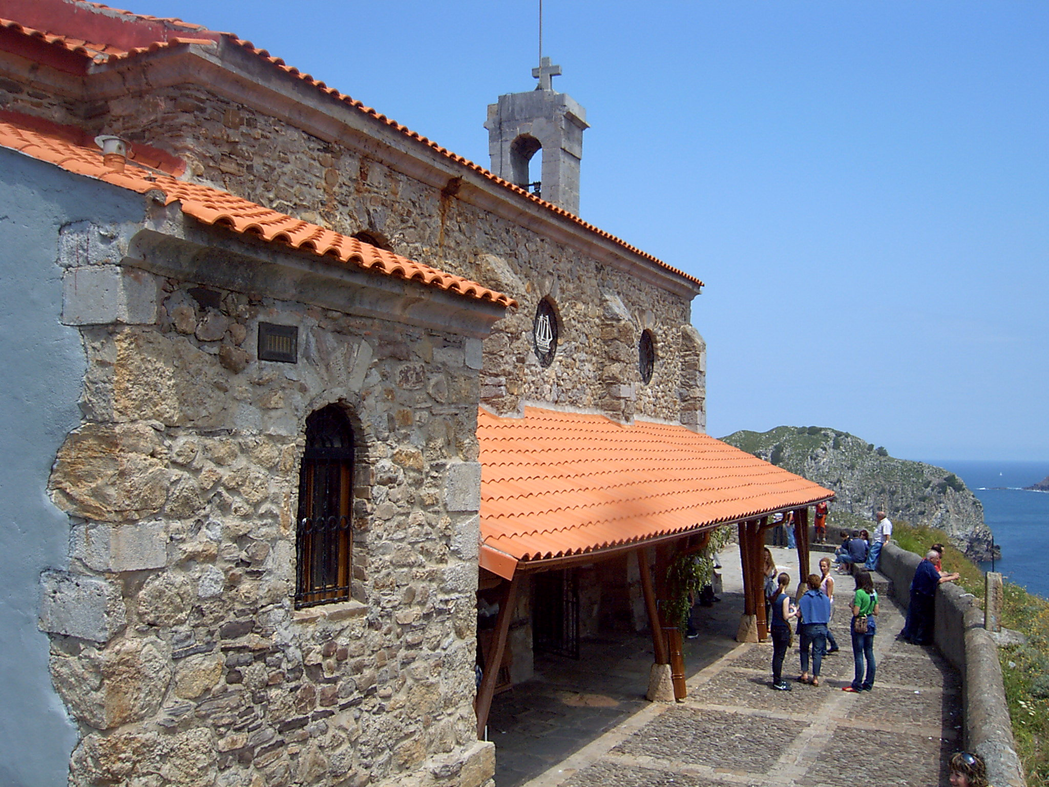 Gaztelugatxe donieneko baseliza